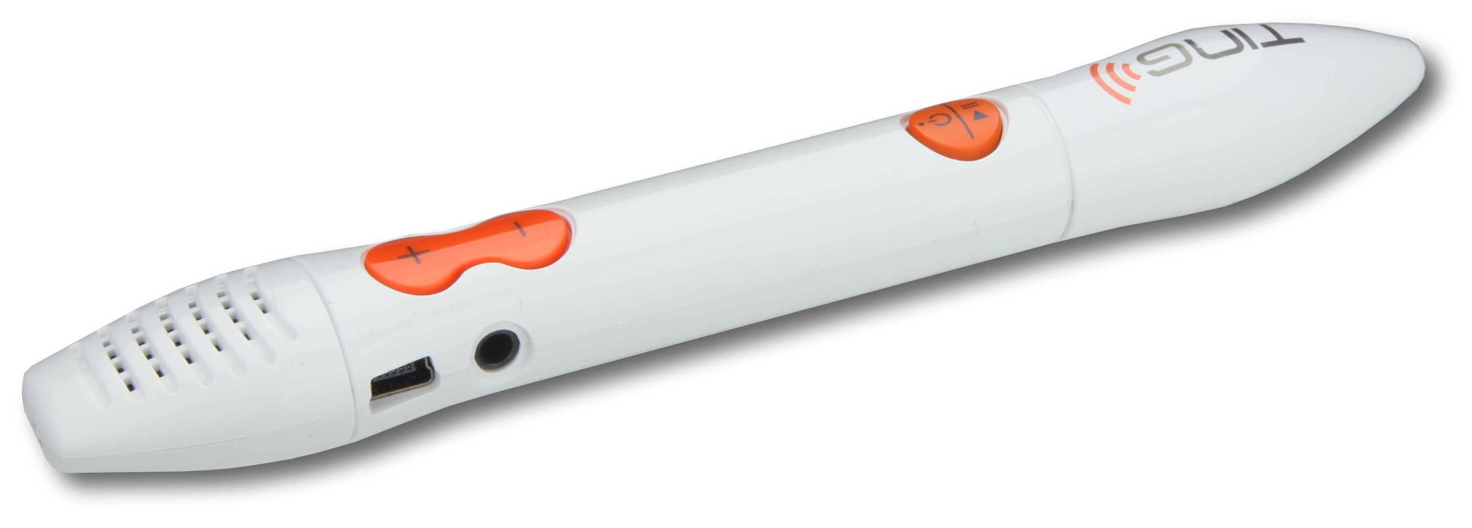 TING Hörstift